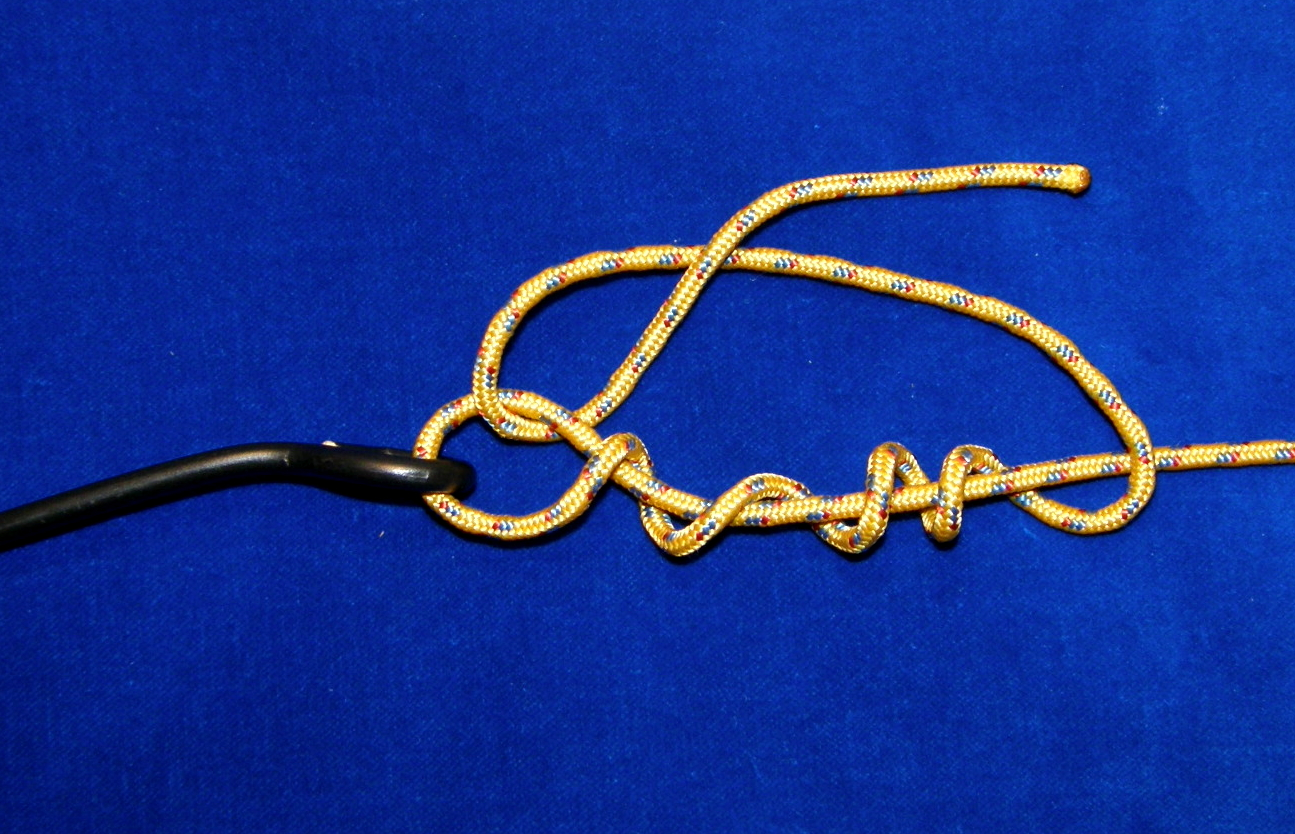 Klammerknoten für Angler